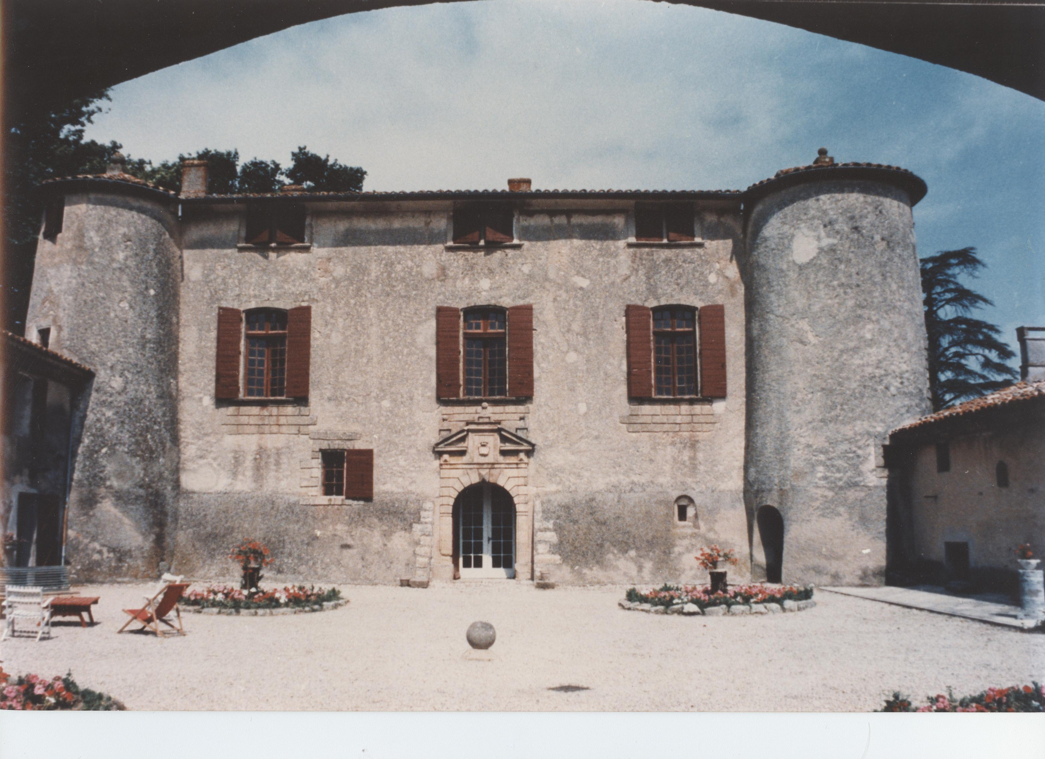 le château de la Calade dans les années 1970